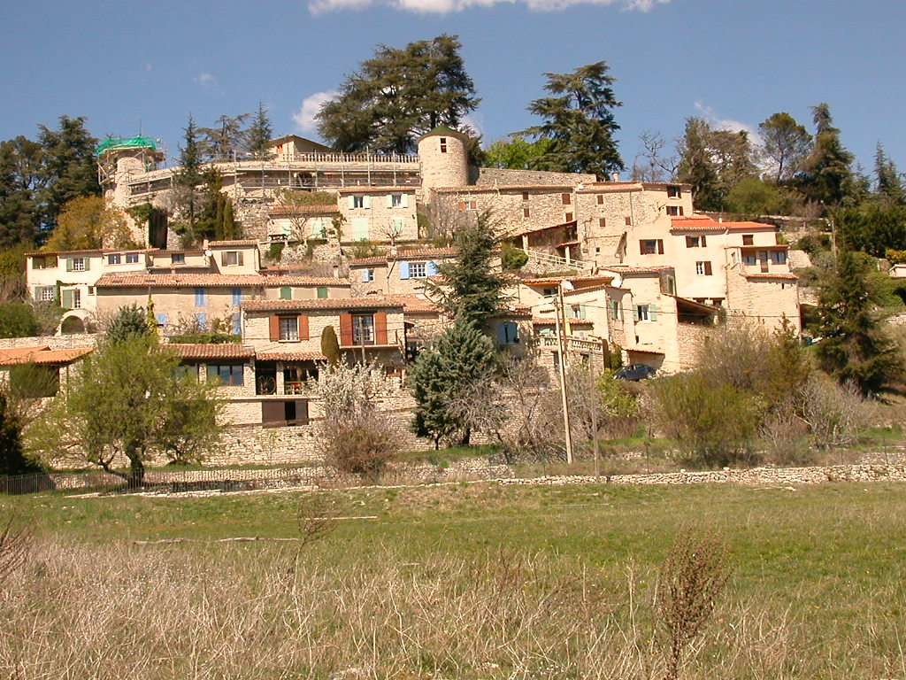 Le Hameau de Lincel, commune de Saint Michel l'Observatoire, Alpes de Haute Provence